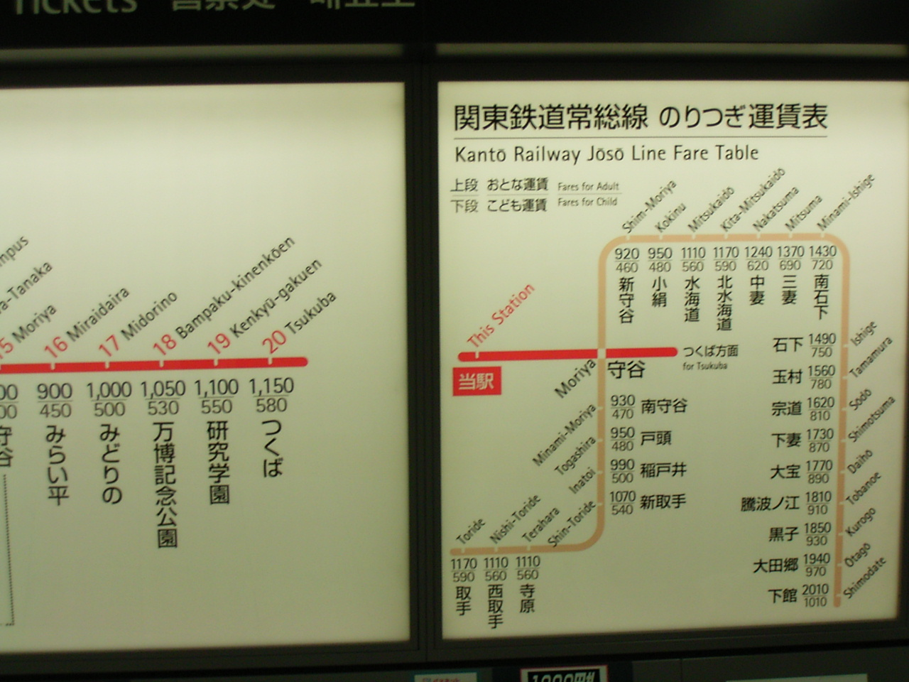 写真概要：つくばエクスプレスの関東鉄道常総線連絡運賃表 撮影者：アップロード者に同じ（Sinryow） 撮影地：秋葉原駅のつくばエクスプレス自動券売機前